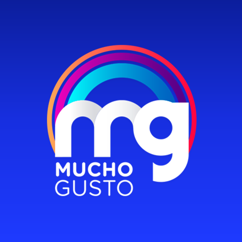 Logo Mucho Gusto